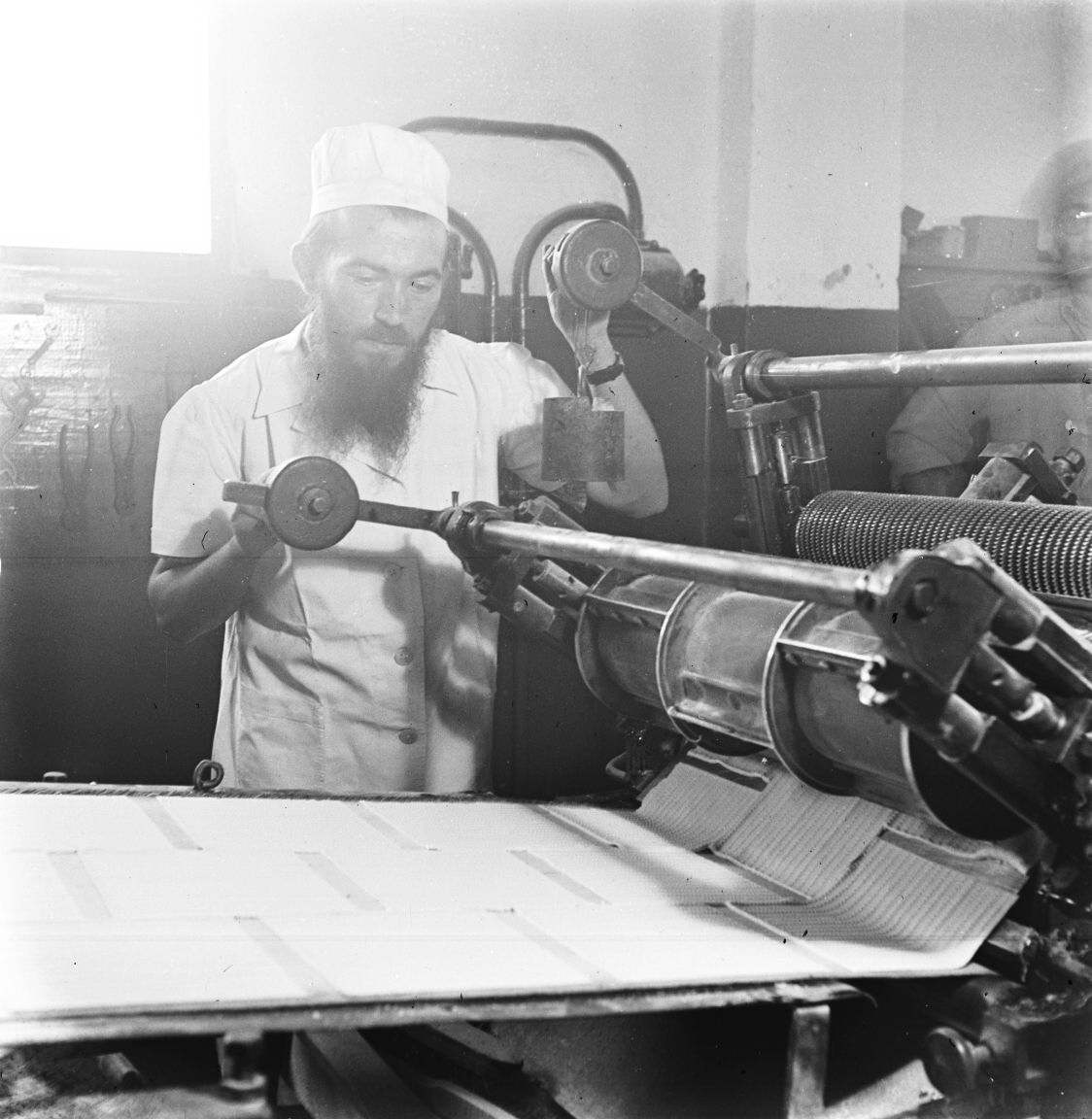 אוסף צילומים של הצלם זולטן קלוגר טווח מספרי התשלילים 31284 - 31331